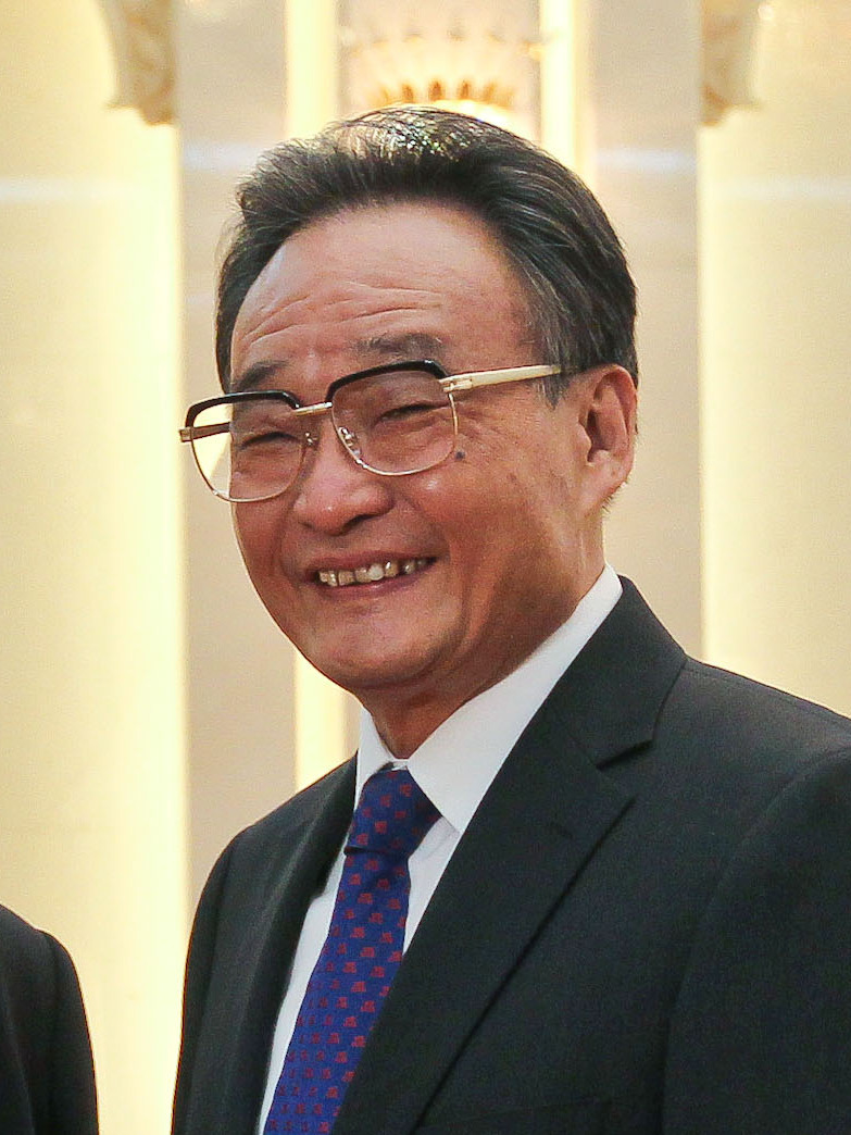 Pequim - China, 13/04/2011. Presidenta Dilma Rousseff durante encontro com o Presidente da Assembléia Popular Nacional, Senhor Wu Bangguo no Grande Palácio do Povo. Foto: Roberto Stuckert Filho/PR.